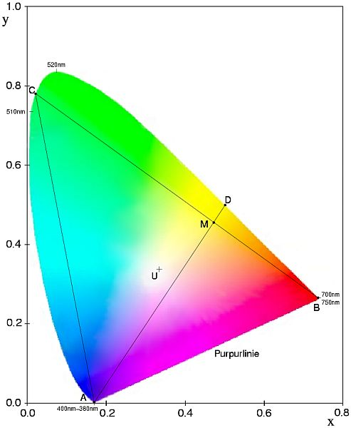 CIE-Normfarbtafel